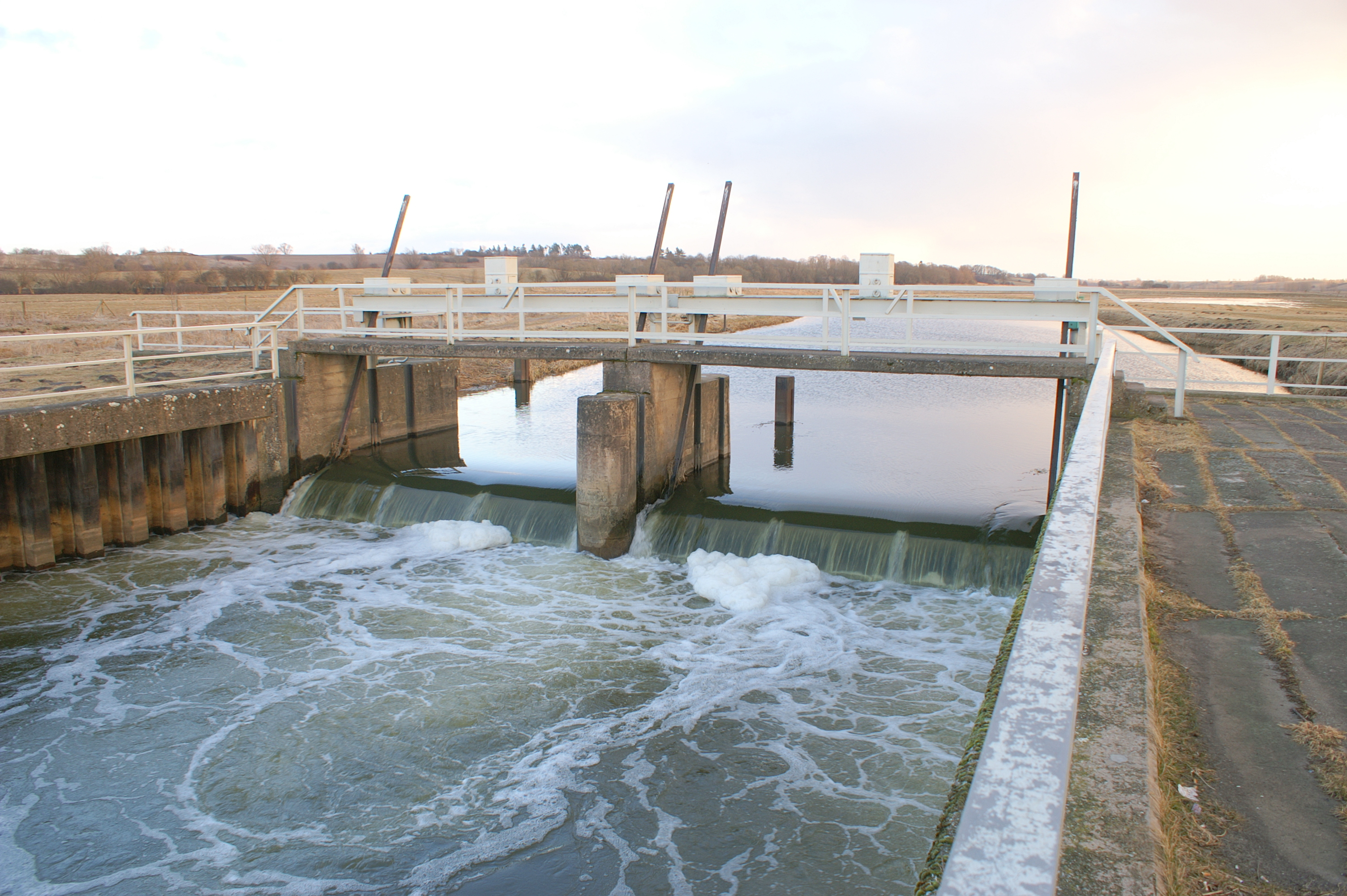 Tollensewehr in Tückhude, durchschnittlicher Pegelstand